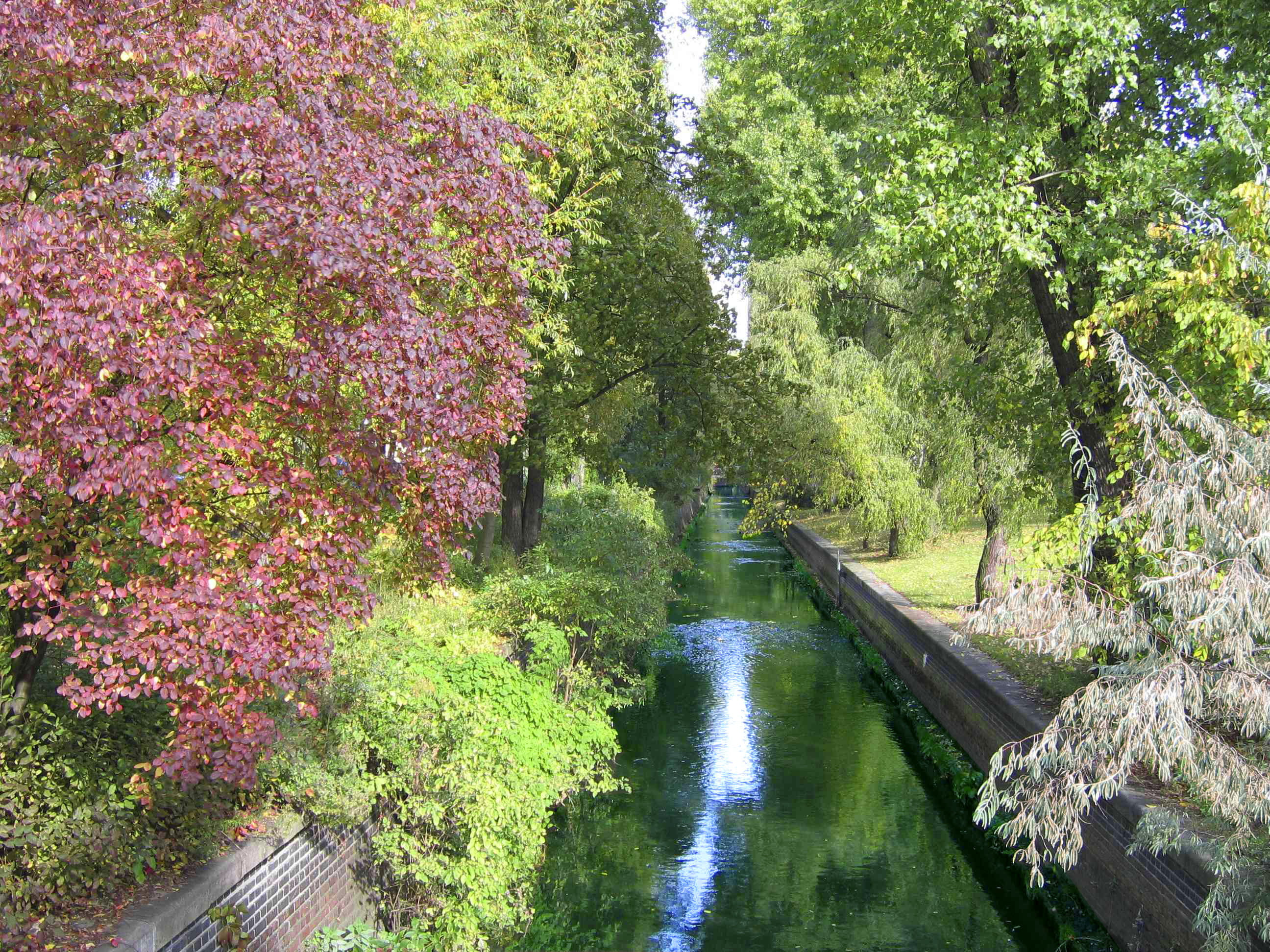 Der Seitenarm der Panke in Berlin-Gesundbrunnen im Herbst selbst fotografiert GNU-FDL